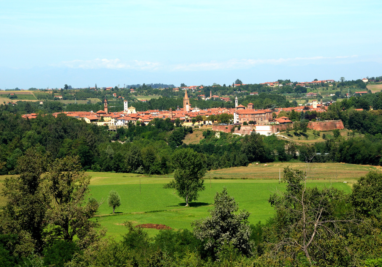 Panorama di Bene Vagienna (provincia di Cuneo)